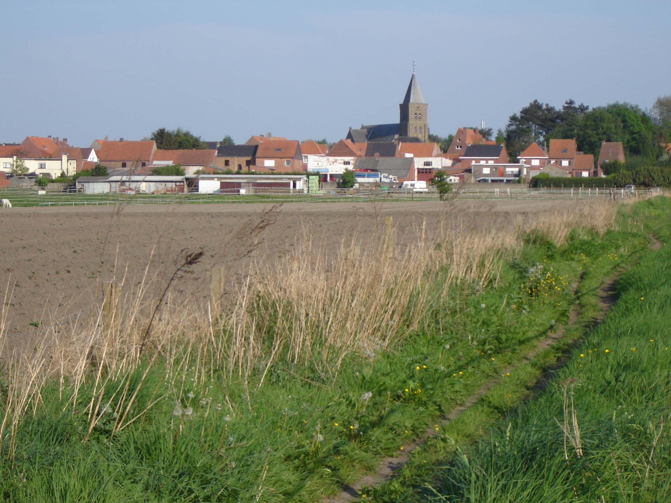 Uitzicht op Wijnendale View on Wijnendale, Torhout, West Flanders, Belgium